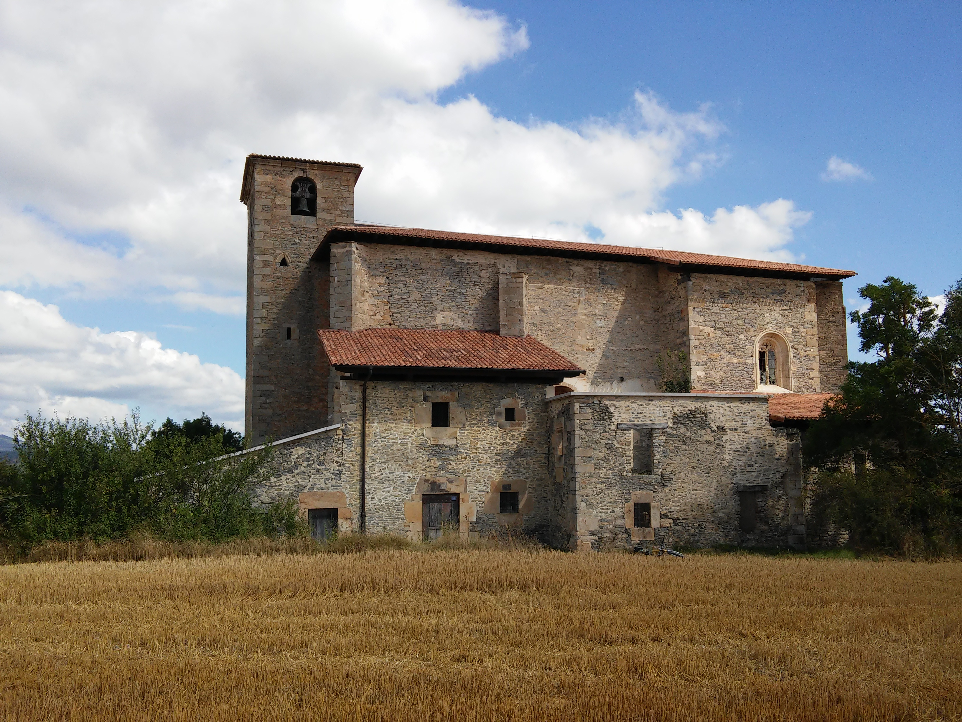 Ziraoko eliza